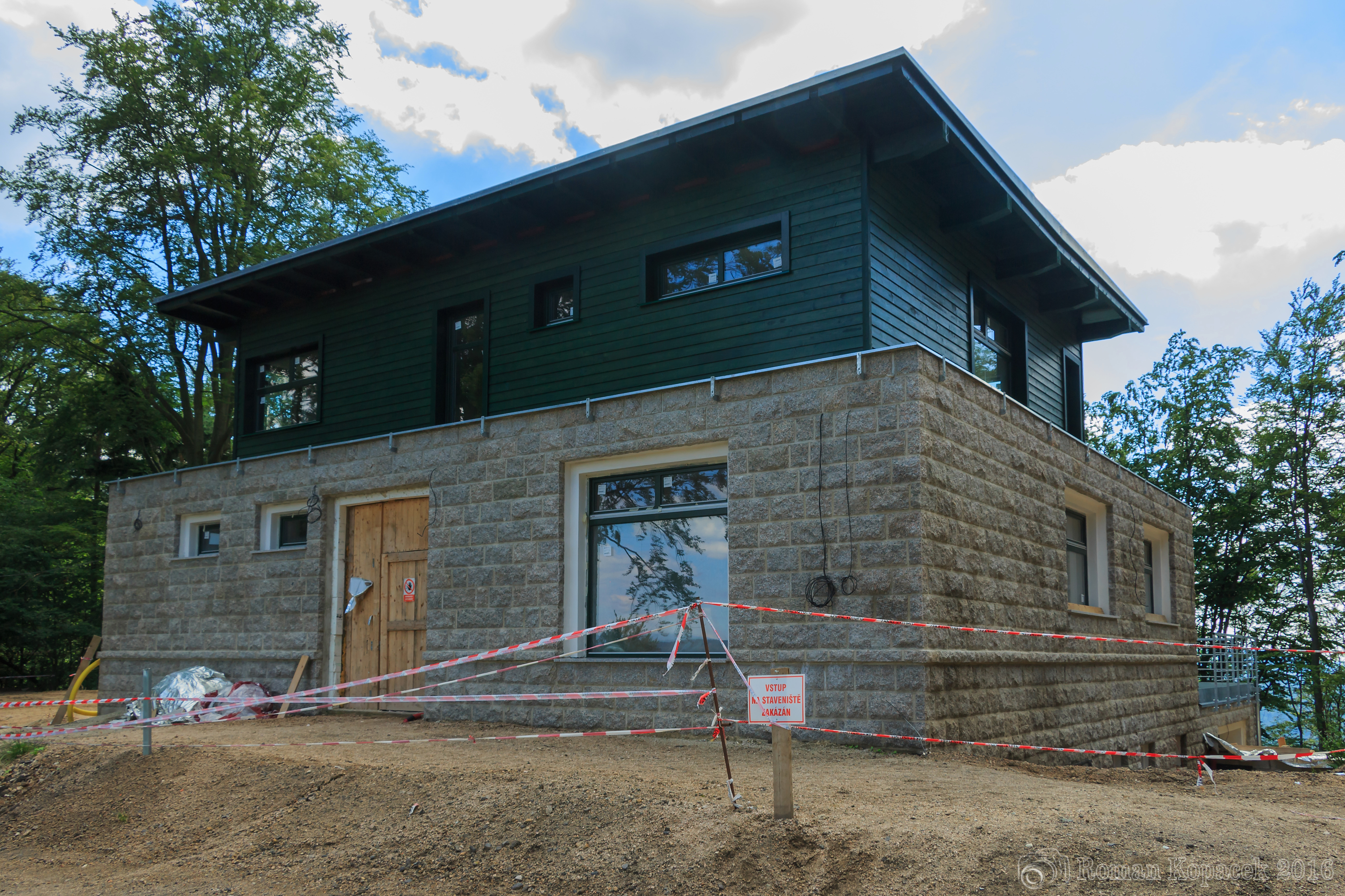 Fotografie pořízena při výletu na rozhlednu.